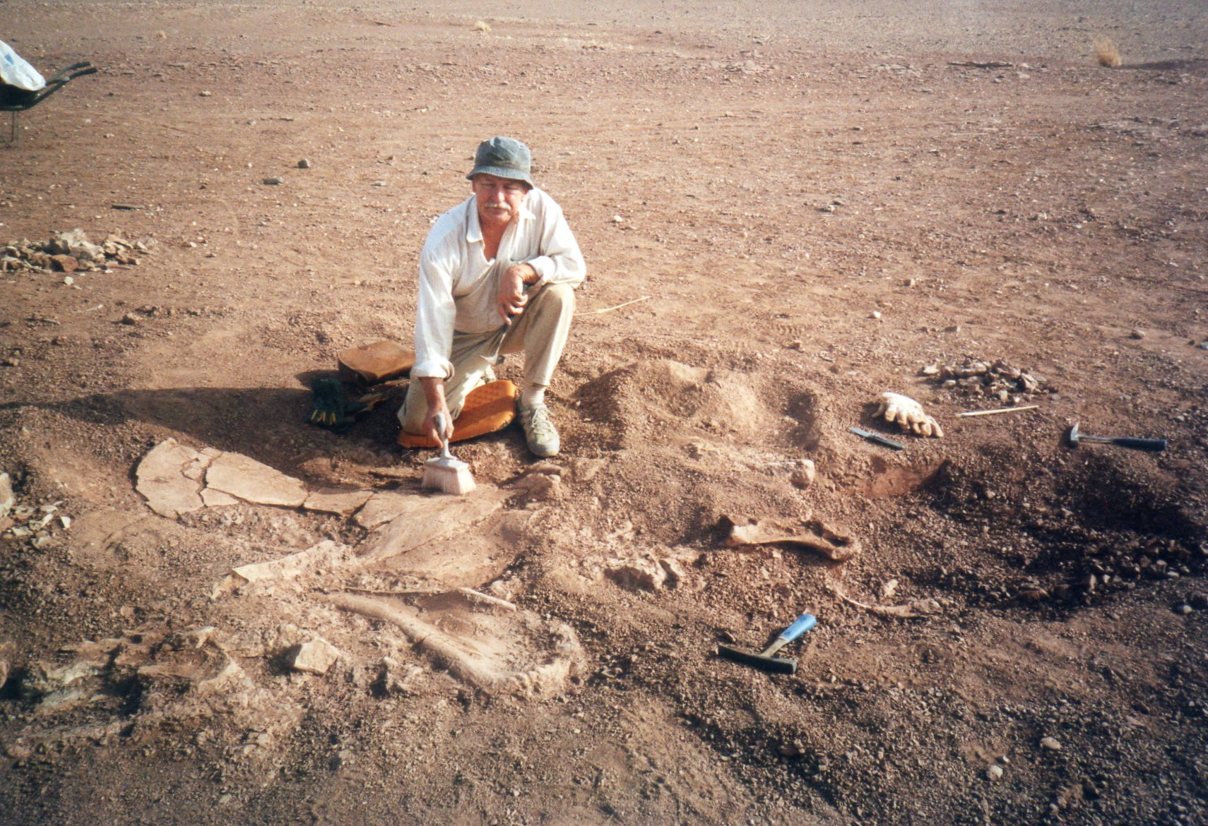 F.J. Krüger bei der Freilegung der ersten Knochen des Dinosauriers Spinophorosaurus nigerensis, Südlich Agadez, Niger, Afrika, 2007